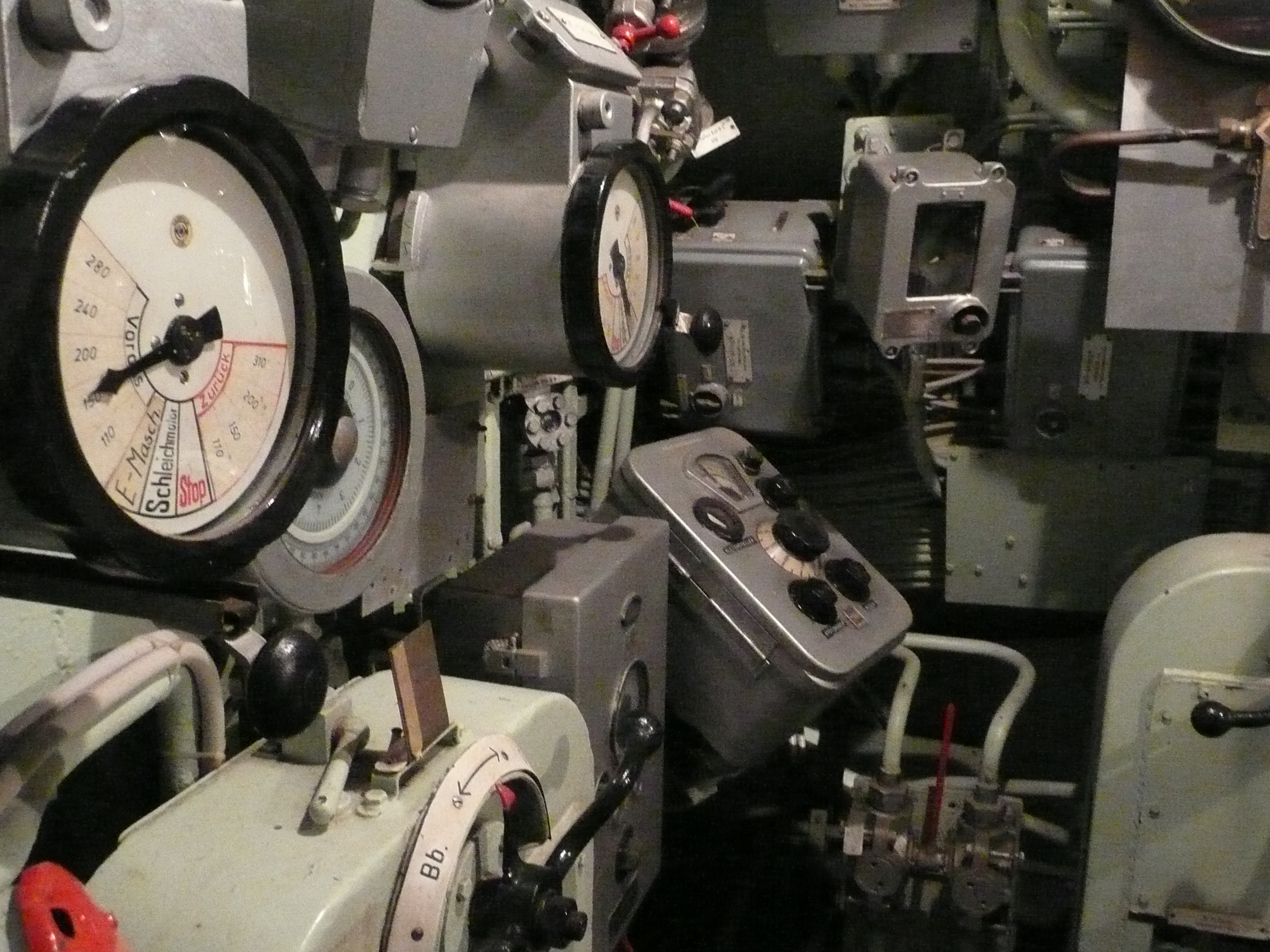 Teil des zentralen Fahrstandes des Typ XXI Museums-U-Bootes Wilhelm Bauer.